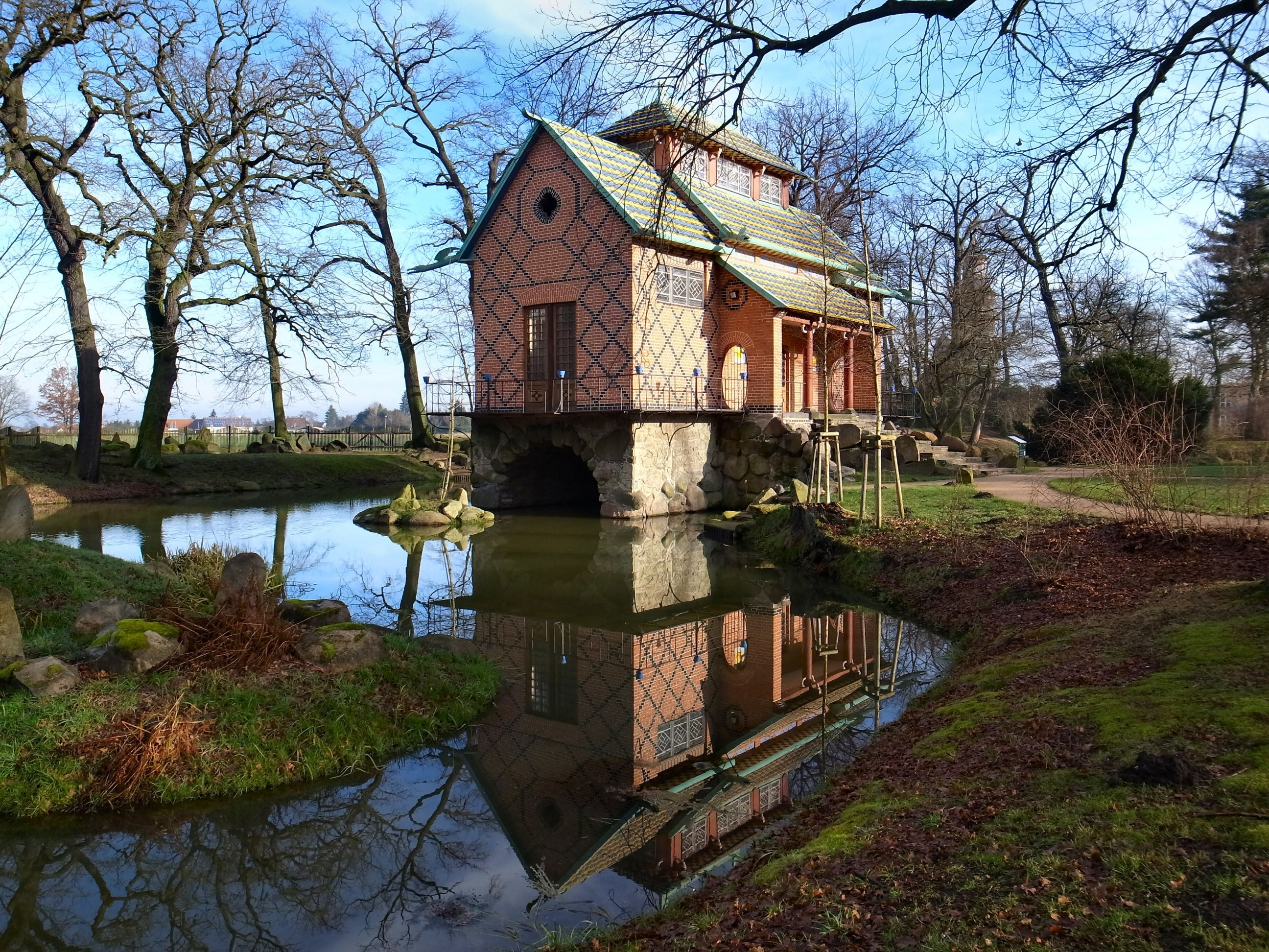 Oranienbaum,Chinesisches Haus / Chinesisches Haus (um 1793 erbautes Gartenhaus, Quelle